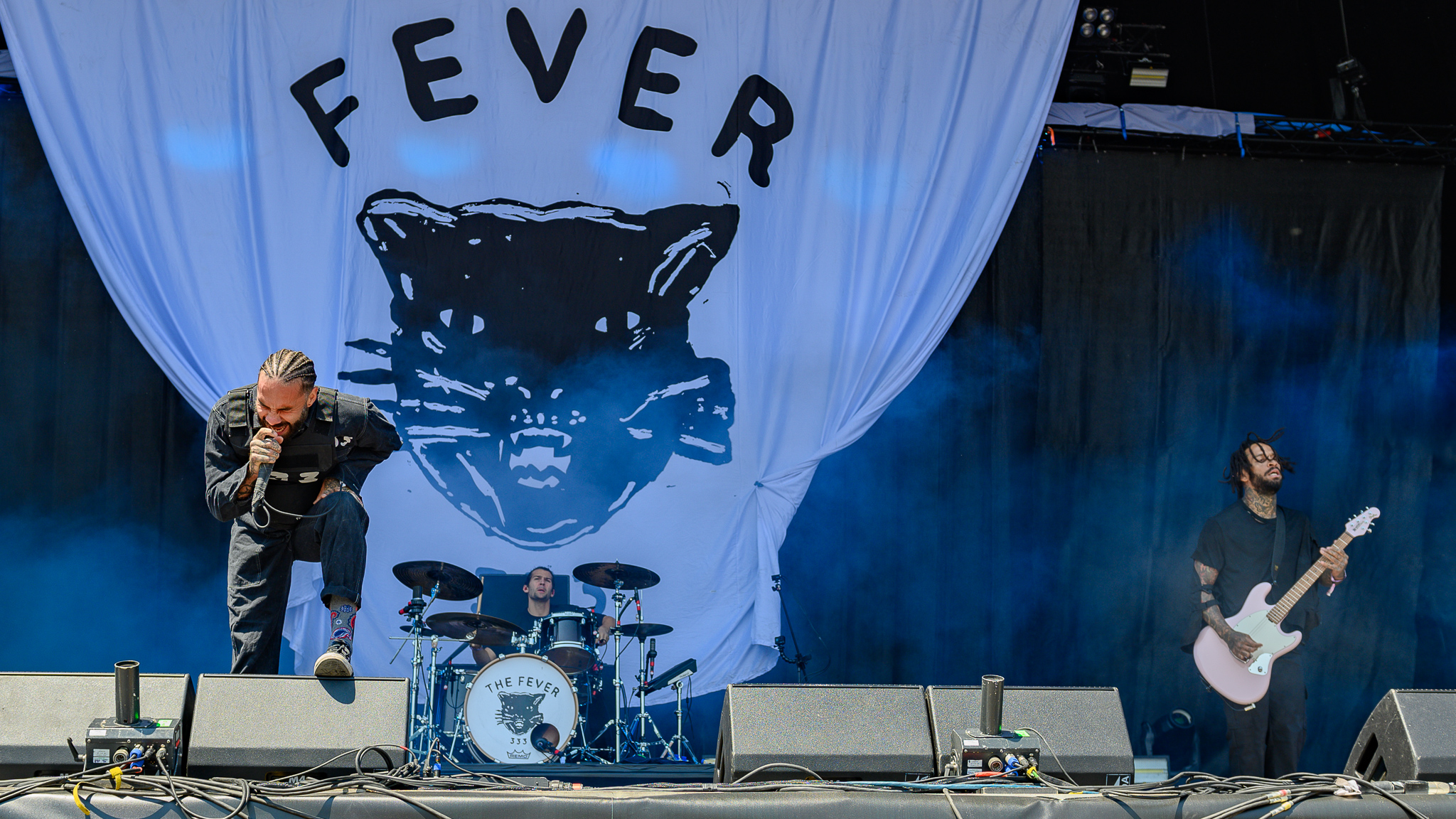 ARGO-Konzerte,Aric Improta,Beck's Park Stage,Fever 333,Jason Aalon Alexander Butler,Konzert,Livekonzert,Livemusik,Musik,RiP,Rock im Park 2019,Stephen Harrison